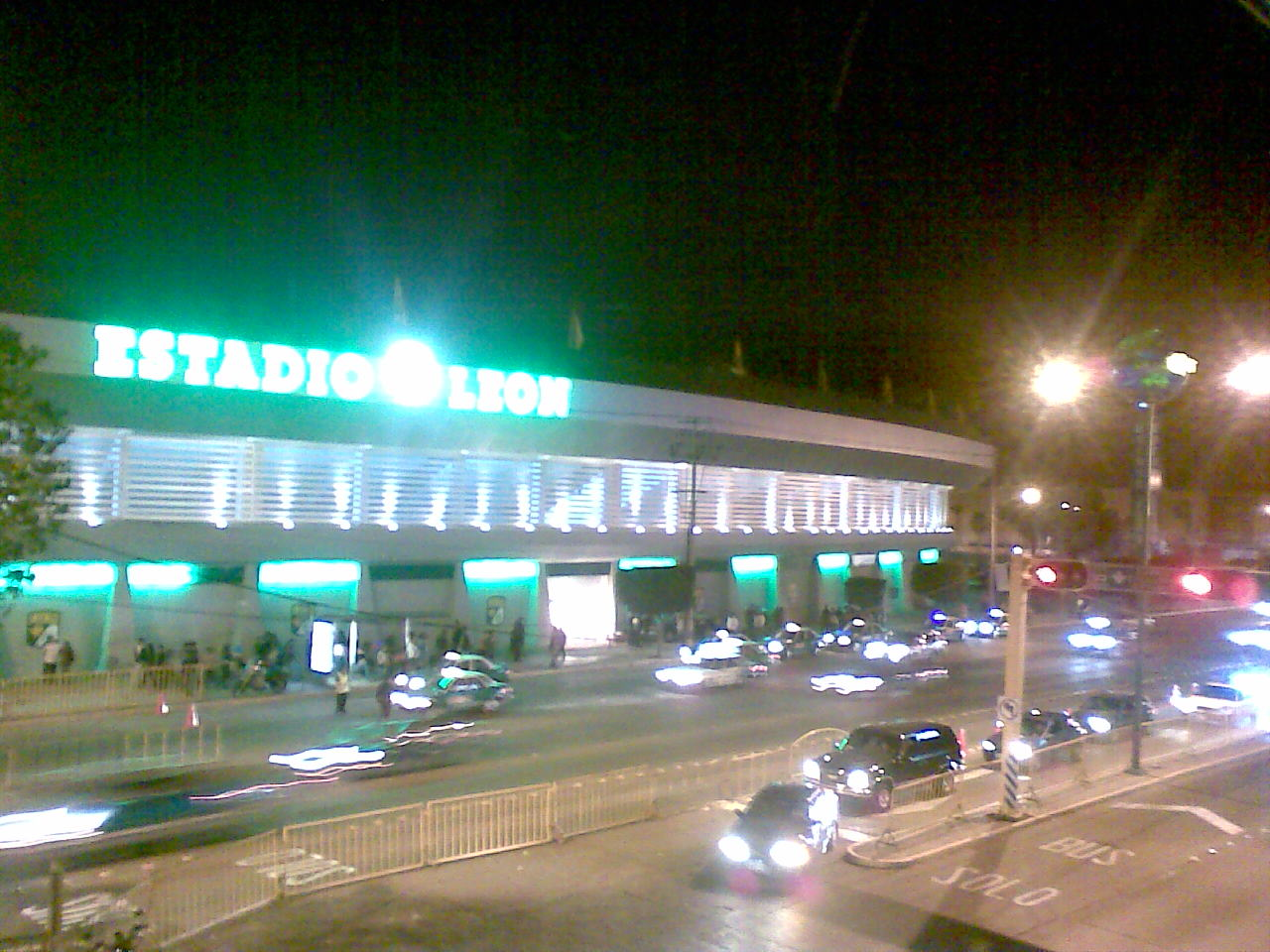 Vista nocturna del Estadio León, tomada desde puente peatonal que está frente a este.